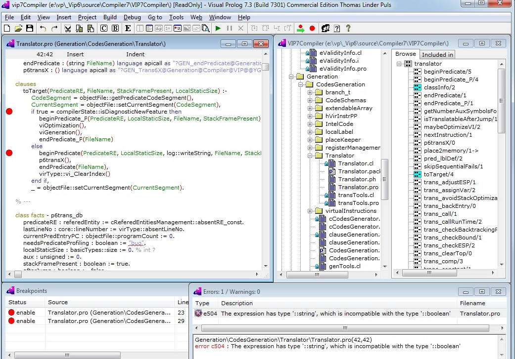 تصویر IDE